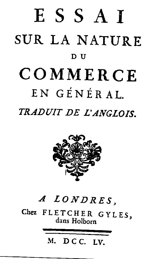 Cover of " Essai Sur La Nature du Commerce en Général" by richard Cantillon